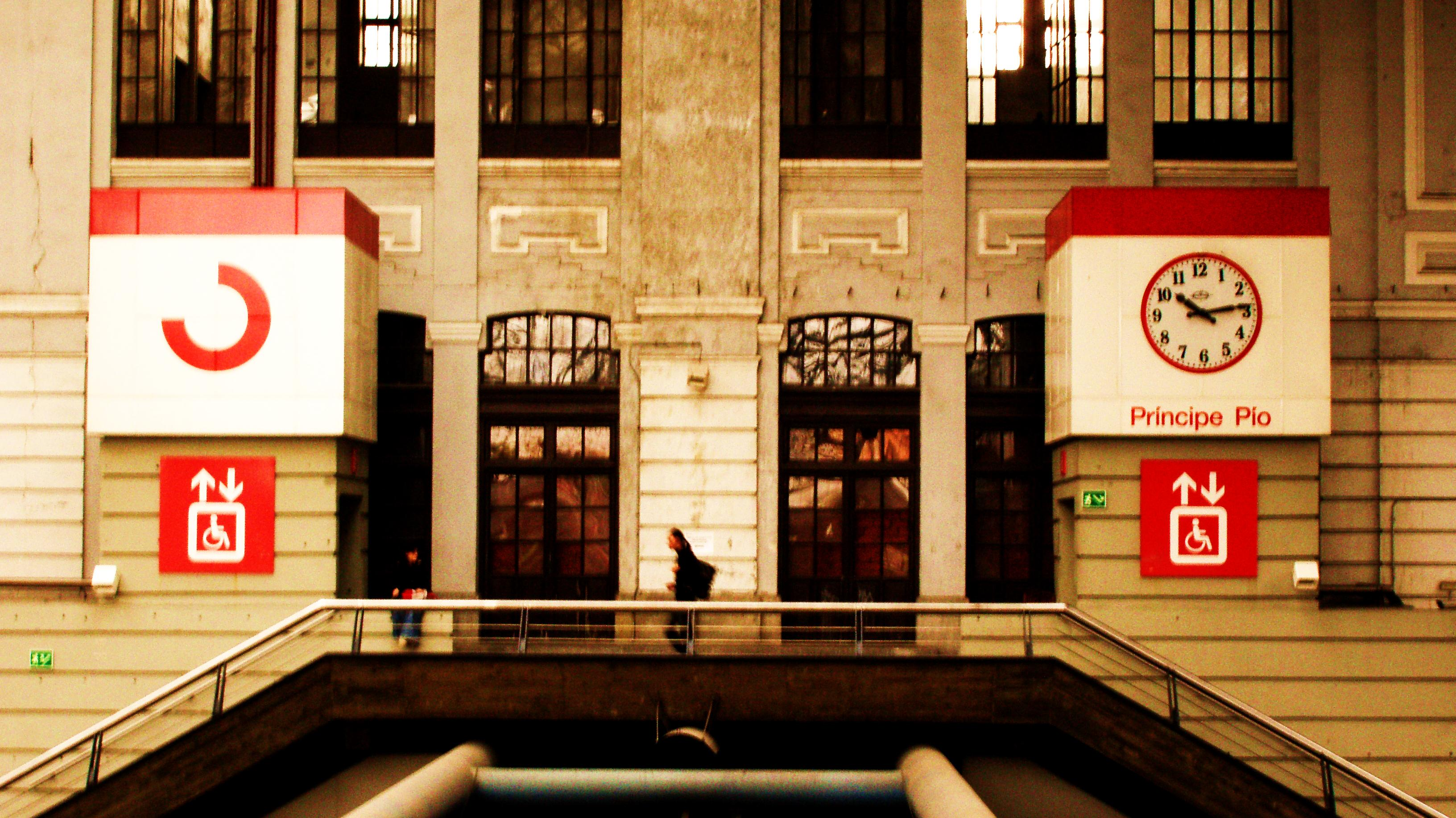 Acceso por ascensor a Cercanías en la estación madrileña de Príncipe Pío.